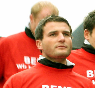 Der Schweizer Nationalspieler Alex Frei beim Einlaufen ins Nati-Camp in Freienbach anlässlich der Vorbereitung auf die WM '06